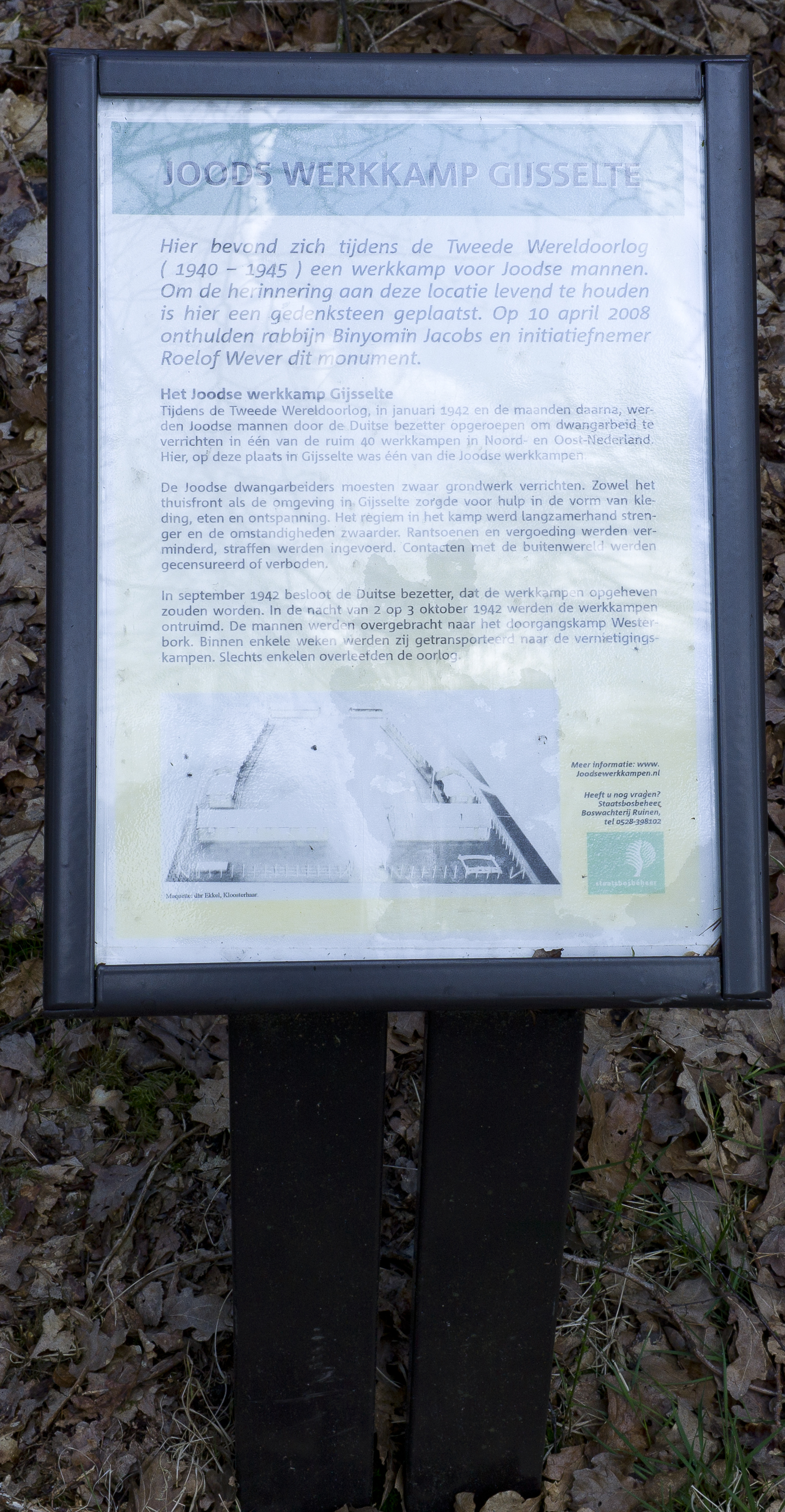 Langgerekte brede strook gras in bosomgeving met aan het eind een tweetal wallen. In de oorlogsperiode was dit in gebruik als schietbaan ten behoeve van een nabijgelegen werkkamp.